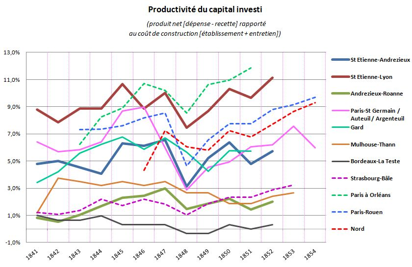 productivité du capital investi dans différentes compagnies de chemins de fer